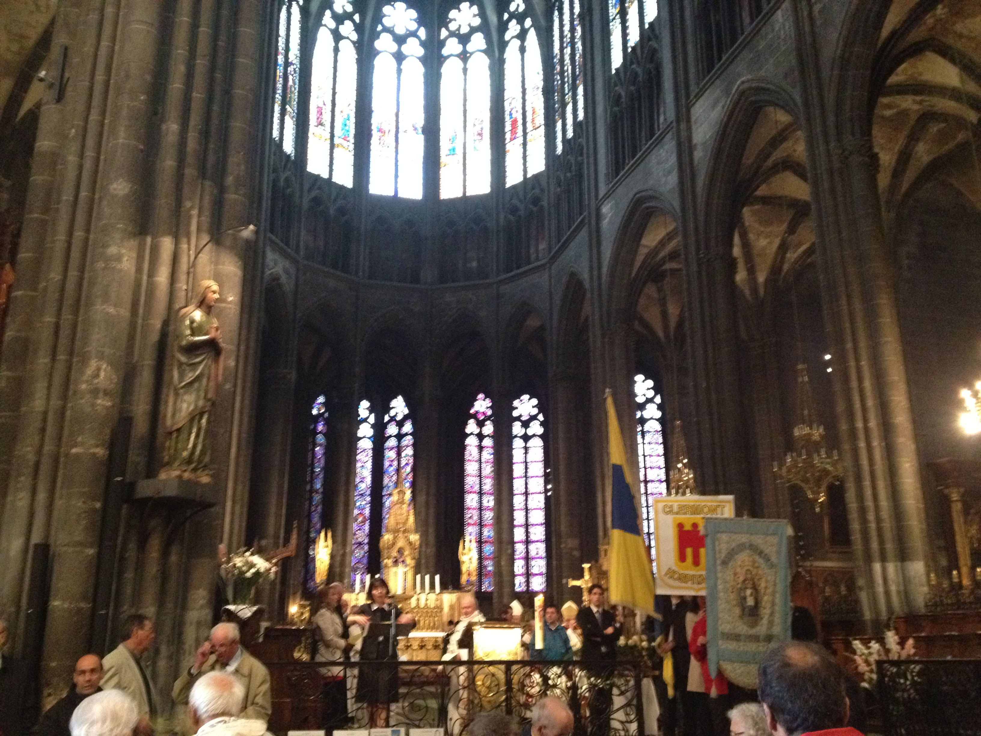 fête de notre-dame du port en Auvergne